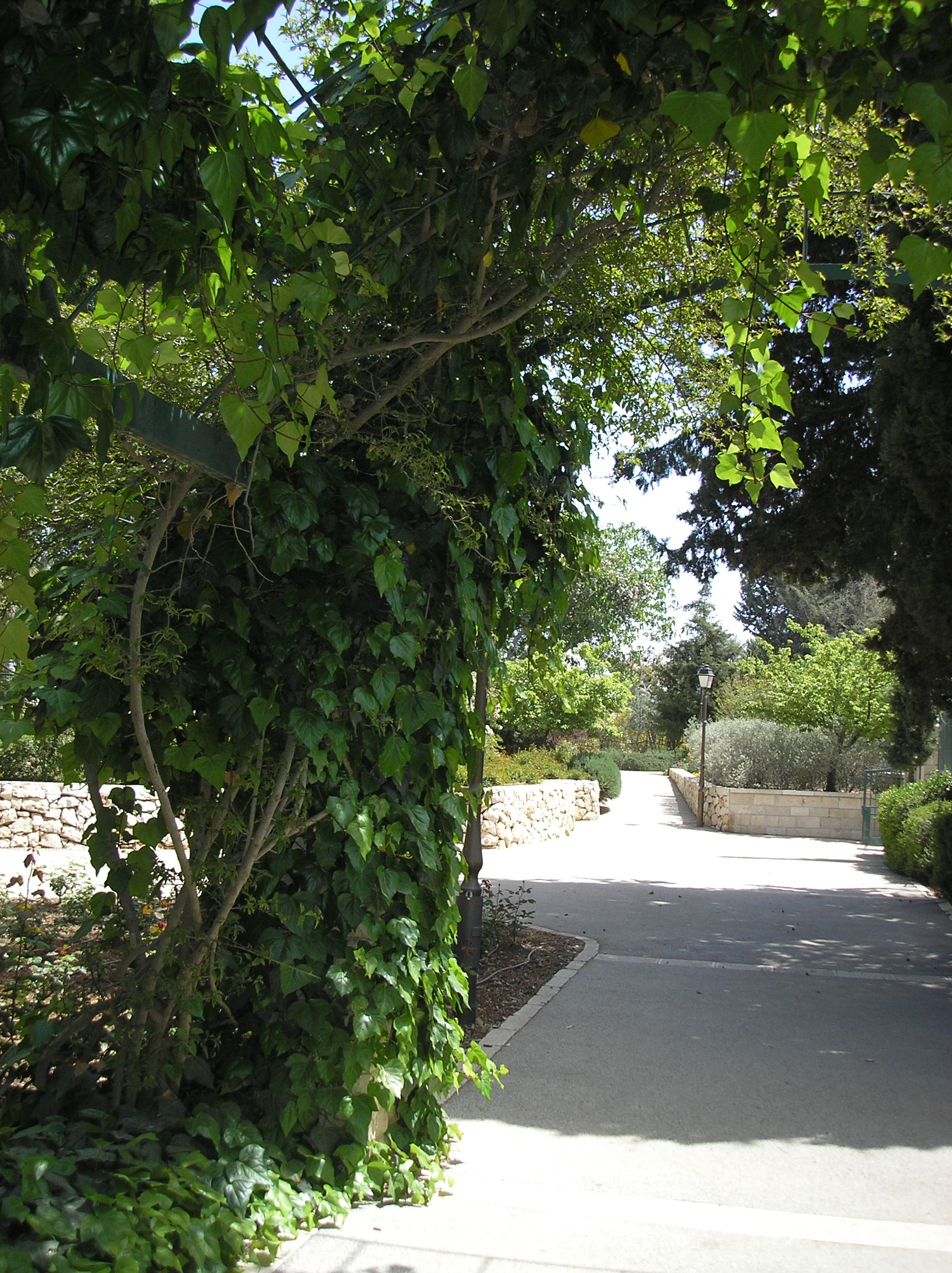 Gan Hashoshanim (Rose Garden), Talbiya, Jerusalem